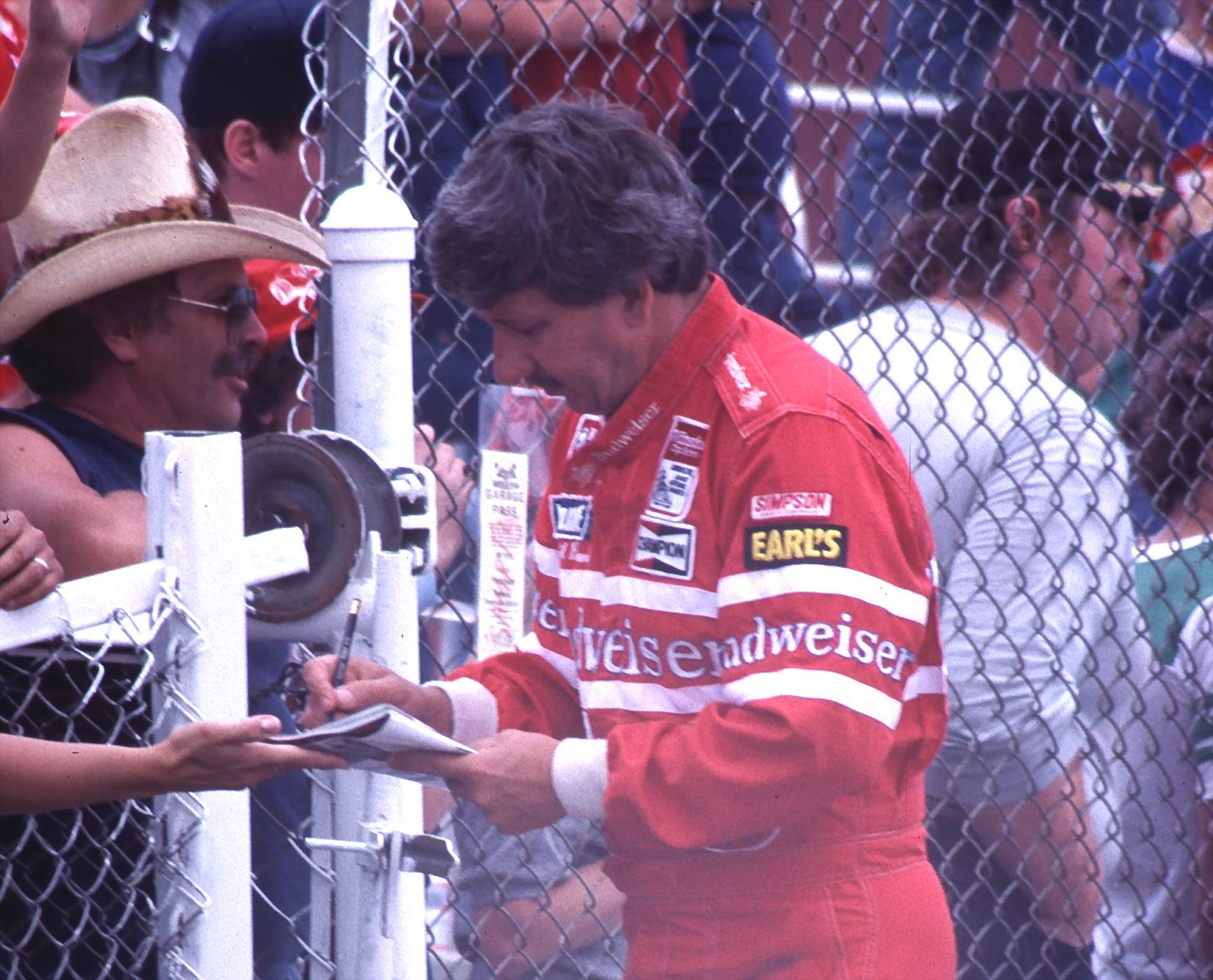 NASCAR driver Neil Bonnett in 1985. Taken by Ted Van Pelt.